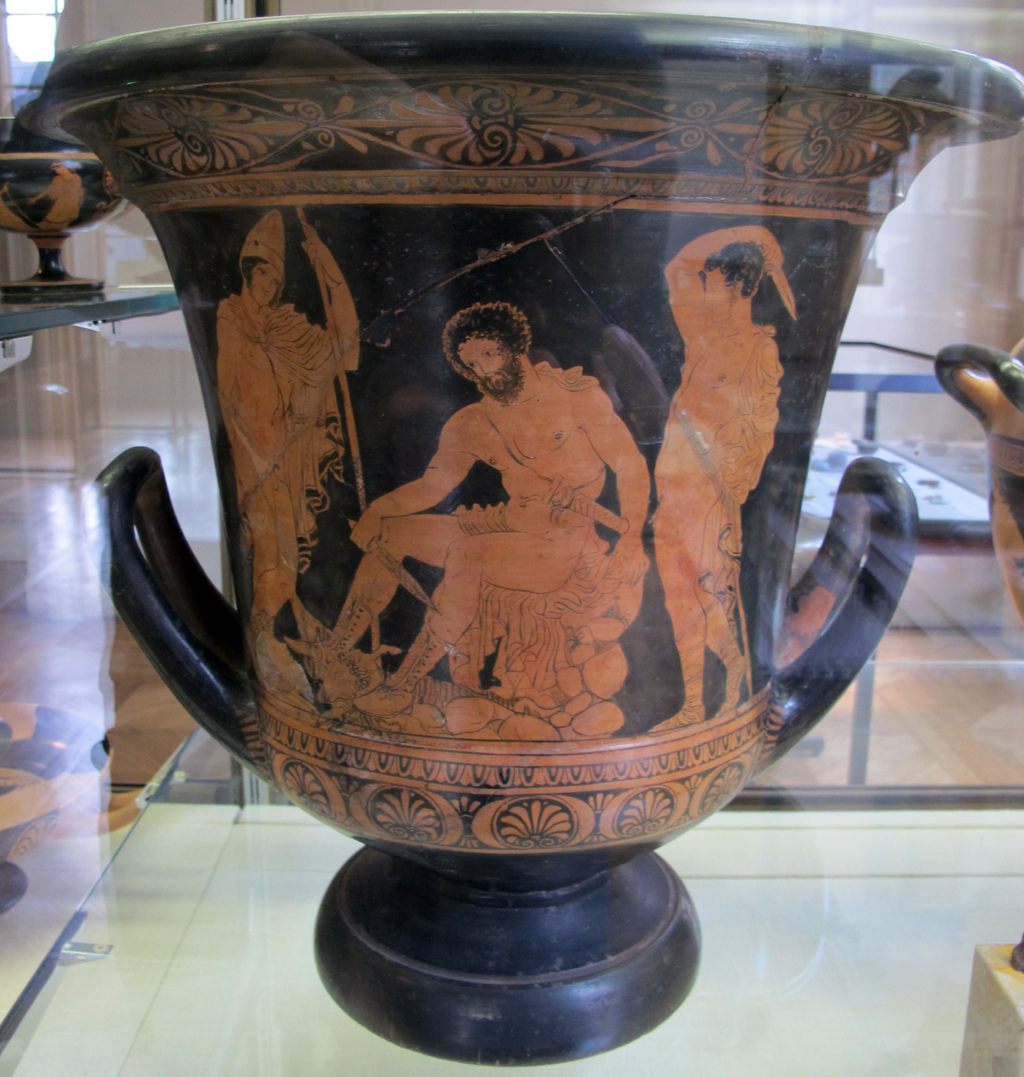 Pittore di dolon, cratere lucano a figure rosse, con ulisse che consulta lo spirito di tiresia e giud. di paride, 380 ac. ca